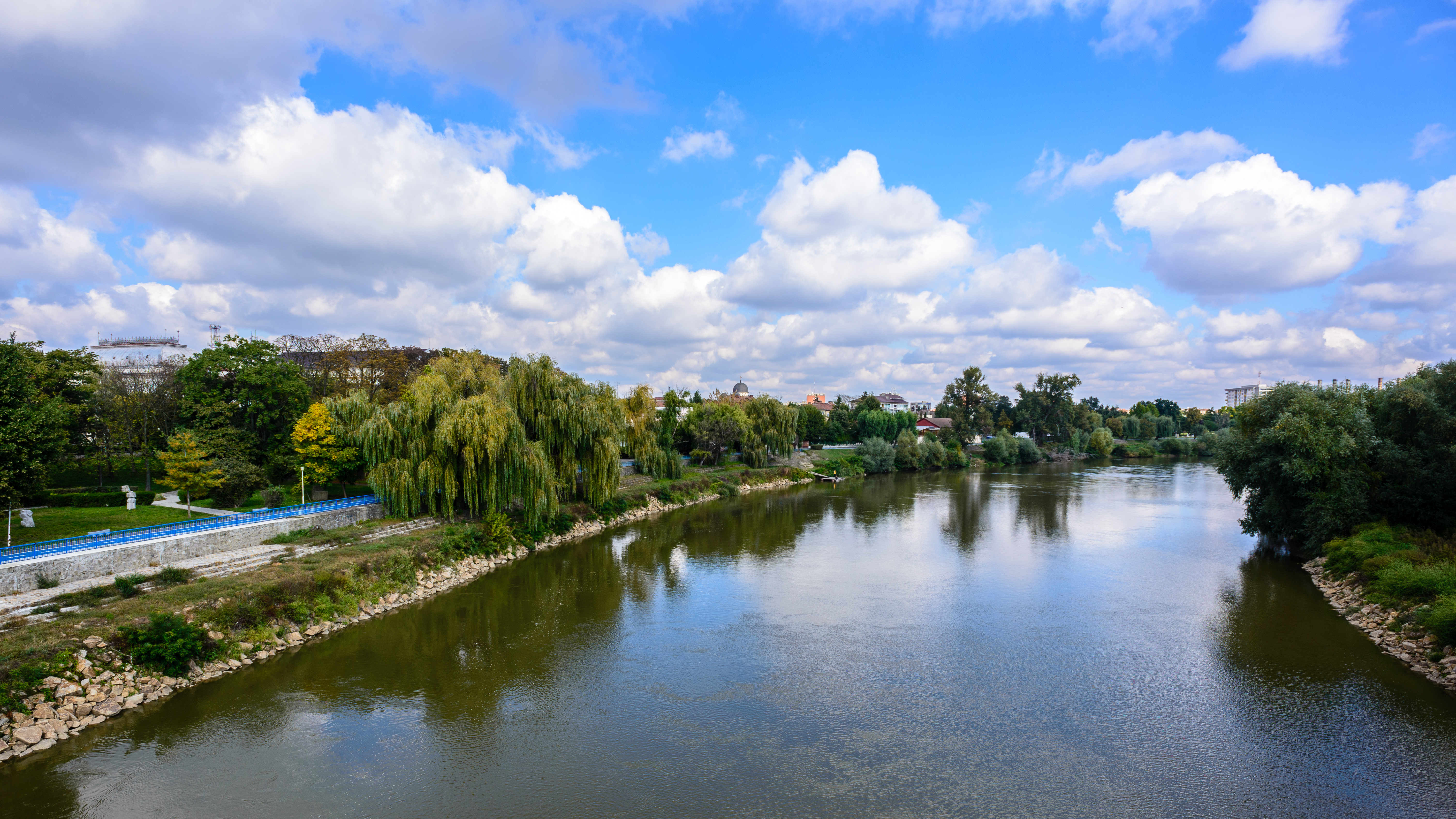 Arad